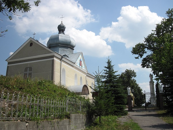 Покровська греко-католицька церква у смт Залізці